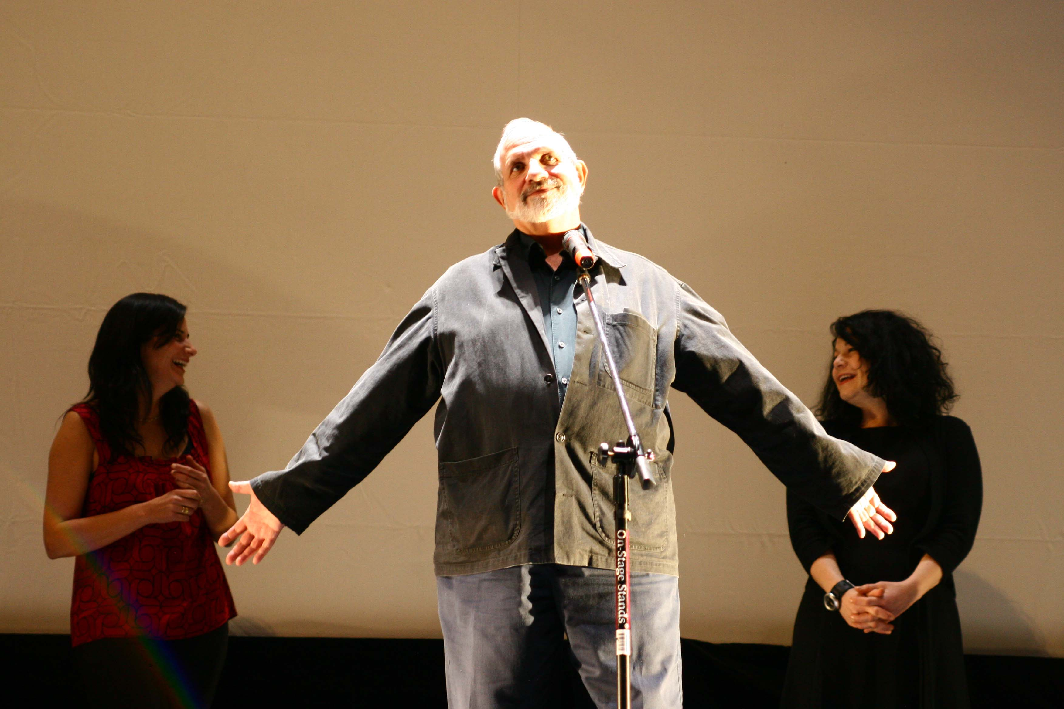 Guadalajara, Jalisco, 9 marzo 2008. Brian de Palma en la presentacion de la pleicula Redacted en el teatro Diana.